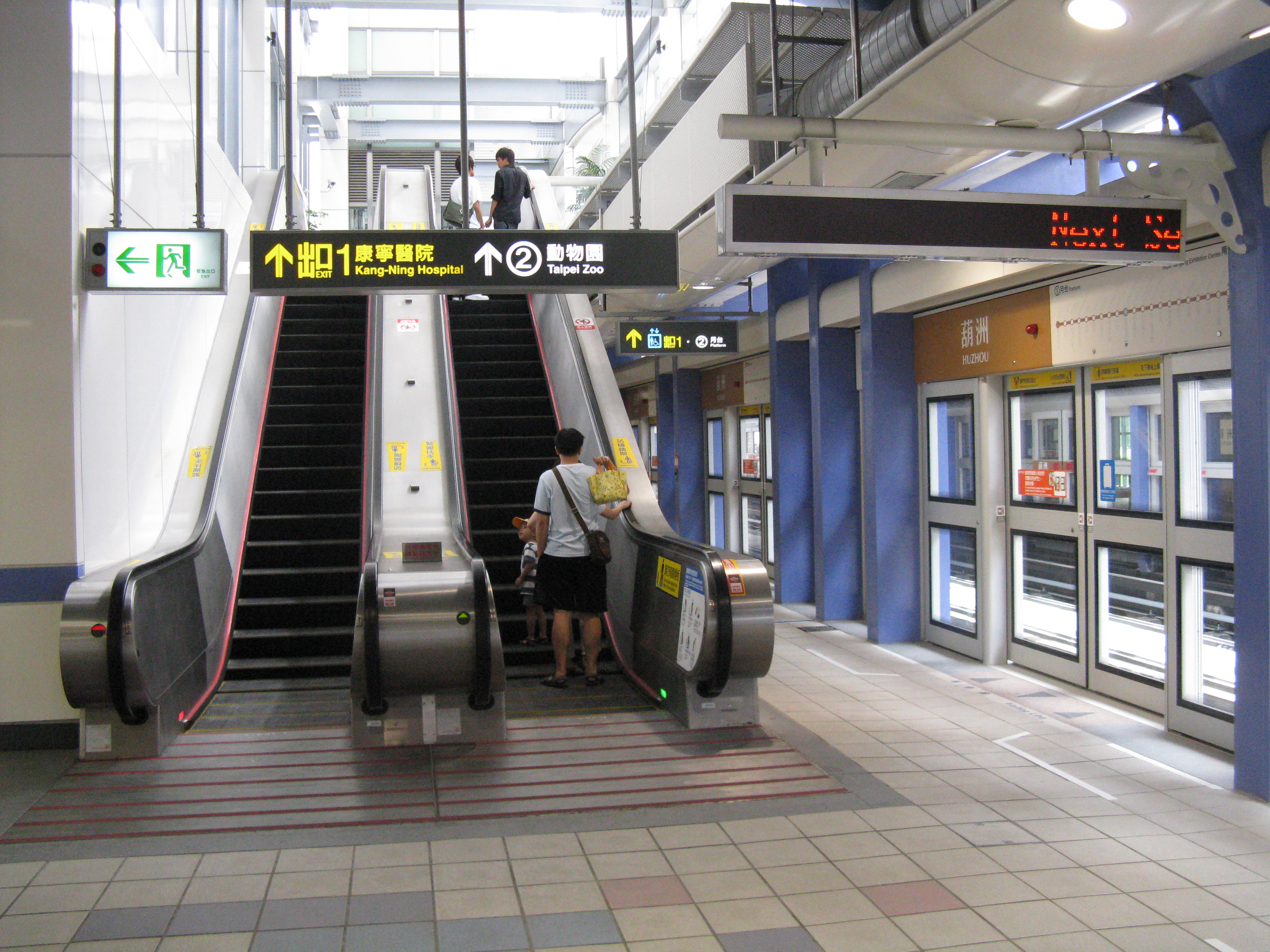 台北捷運内湖線葫洲駅の1番線ホームと跨線橋。